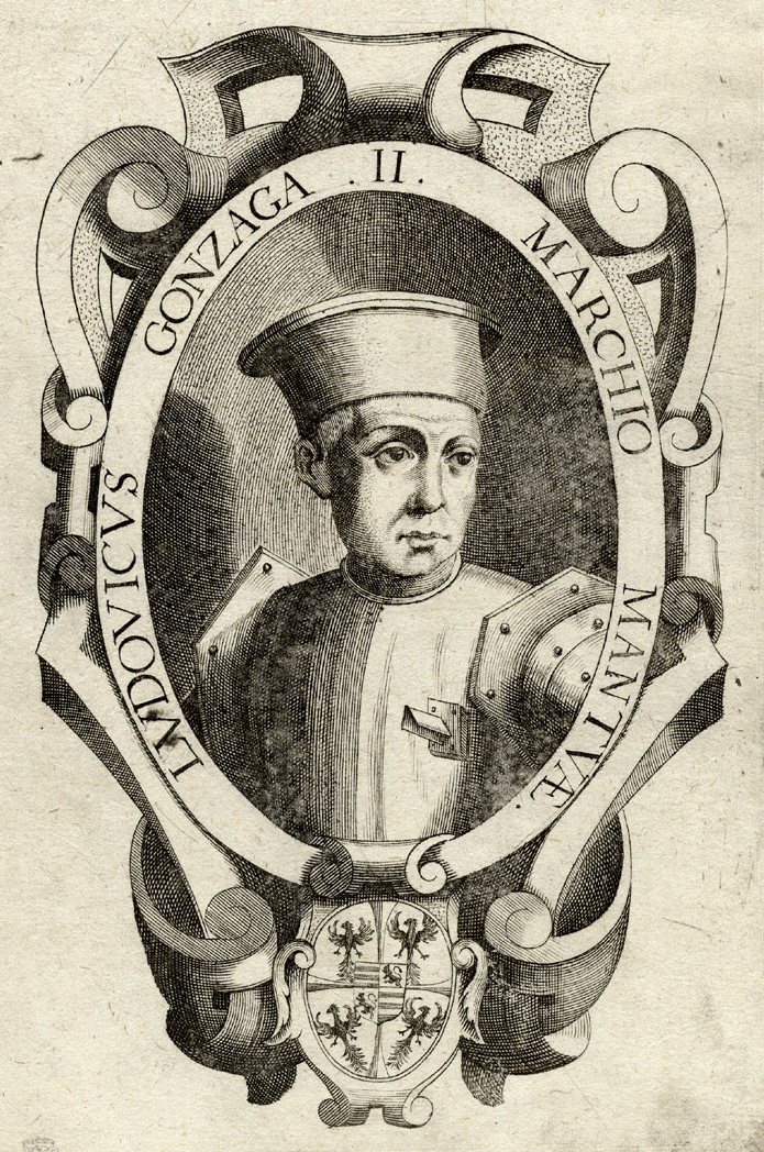 Portrait aus einer Serie von Gonzaga-Portraits, Kupferstich, 17. Jh.; Luigi II.